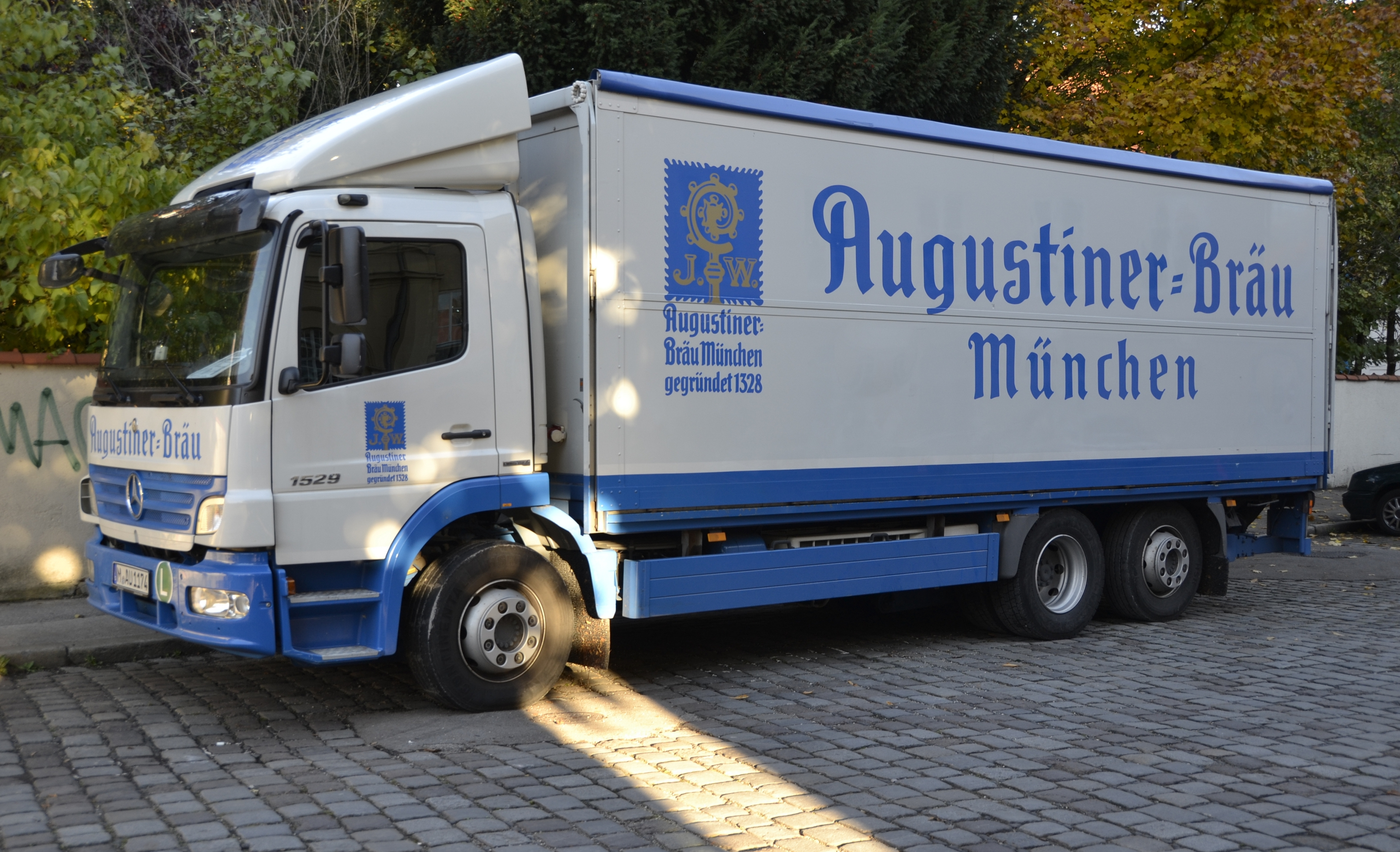 Bierlaster der Brauerei Augustiner-Bräu in München.